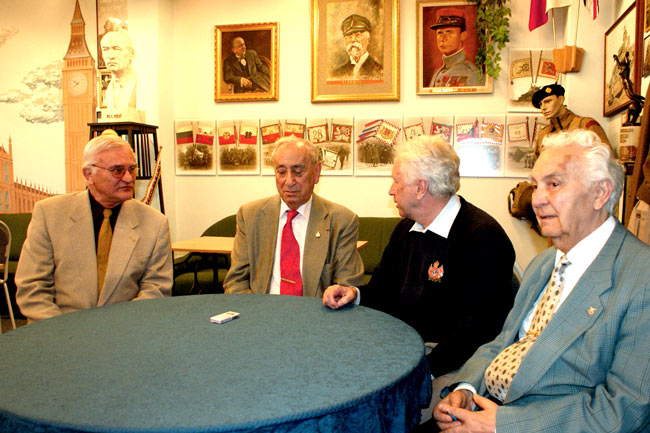 Jan Horal